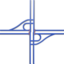 De afbeelding Halfklaverbladaansluiting.png, maar dan een gekruiste variant